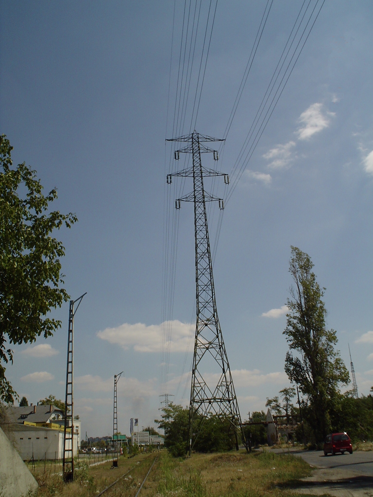 Kabloj liverantaj kurenton.